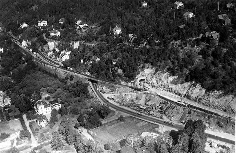 Bekkelaget med omlegging av Østfoldbanen 1958. Gamle Bekkelaget stasjon til venstre, ny holdeplass bygges ved tunnelmunningen.